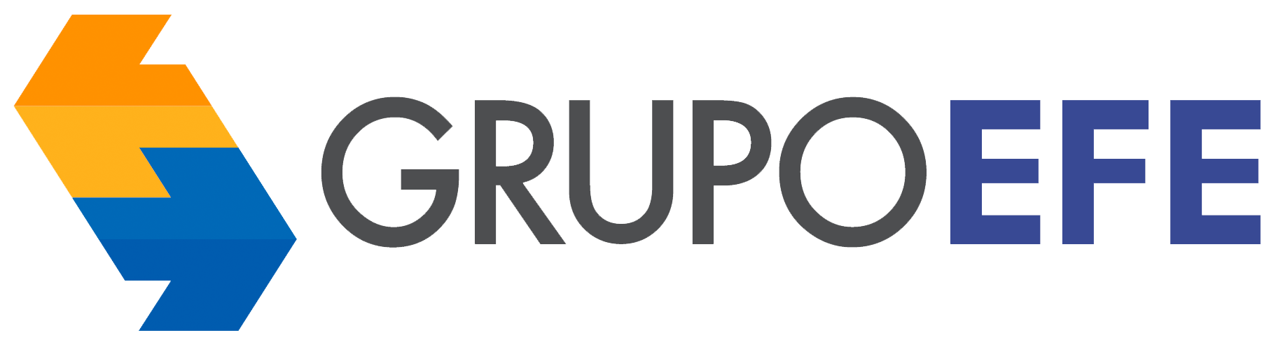 Reproducción del emblema adoptado por el Grupo EFE (Empresa de los Ferrocarriles del Estado) en 2014.